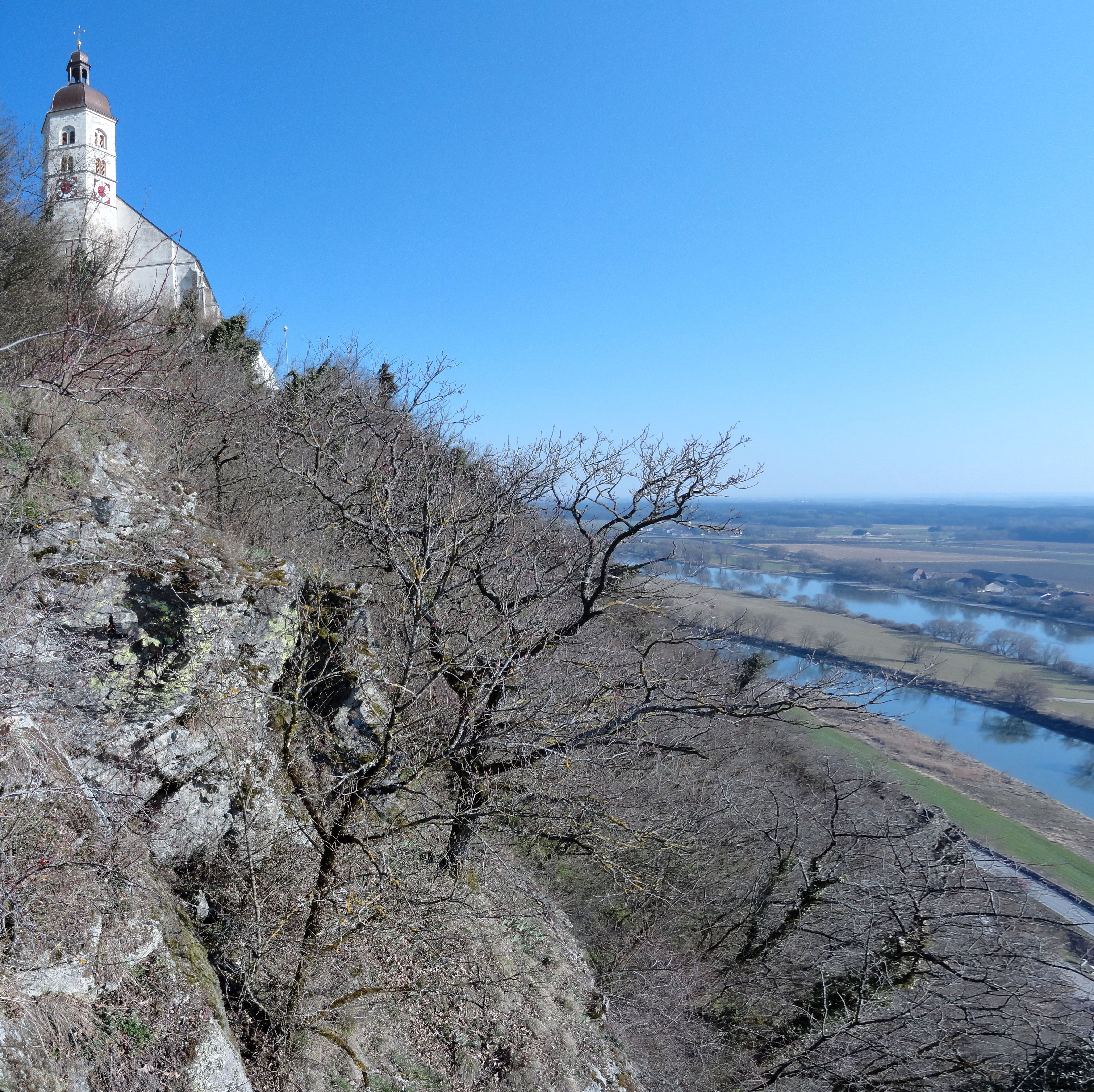 Geotop Bogenberg, Steilhang im Naturschutzgebiet Bogenberg, oben links die Wallfahrtskirche